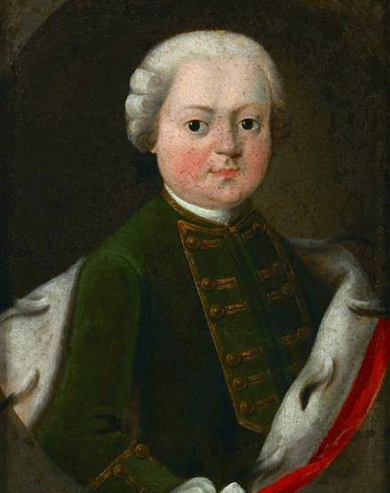 Беларуская (тарашкевіца): Партрэт Гераніма Януша Сангушкі (Hieranim Januš Sanguška)